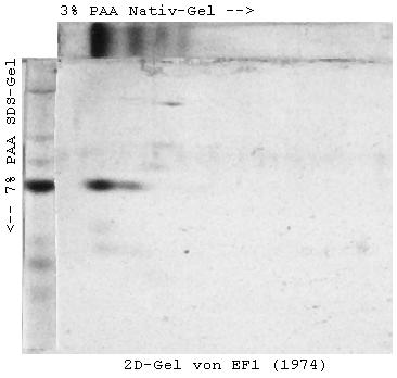 X-Nativ Y-SDS 2-Dimensionales Polyacrylamid-Gel des eukaryotischen Elongation Faktor 1 (Bindungsfaktor) aus Krebs II Maus Ascites Zellen. Man kann deutlich erkennen, dass der Elongation Faktor 1 im nativen Zustand Aggregate bildet, die dann im SDS-Gel zerlegt werden. Anmerkungen:Externer Link